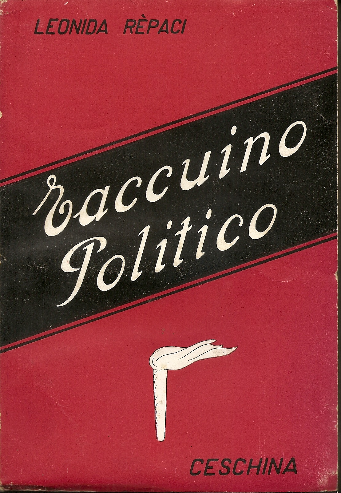 Copertina Taccuino politico di Leonida Repaci Ceschina 1949